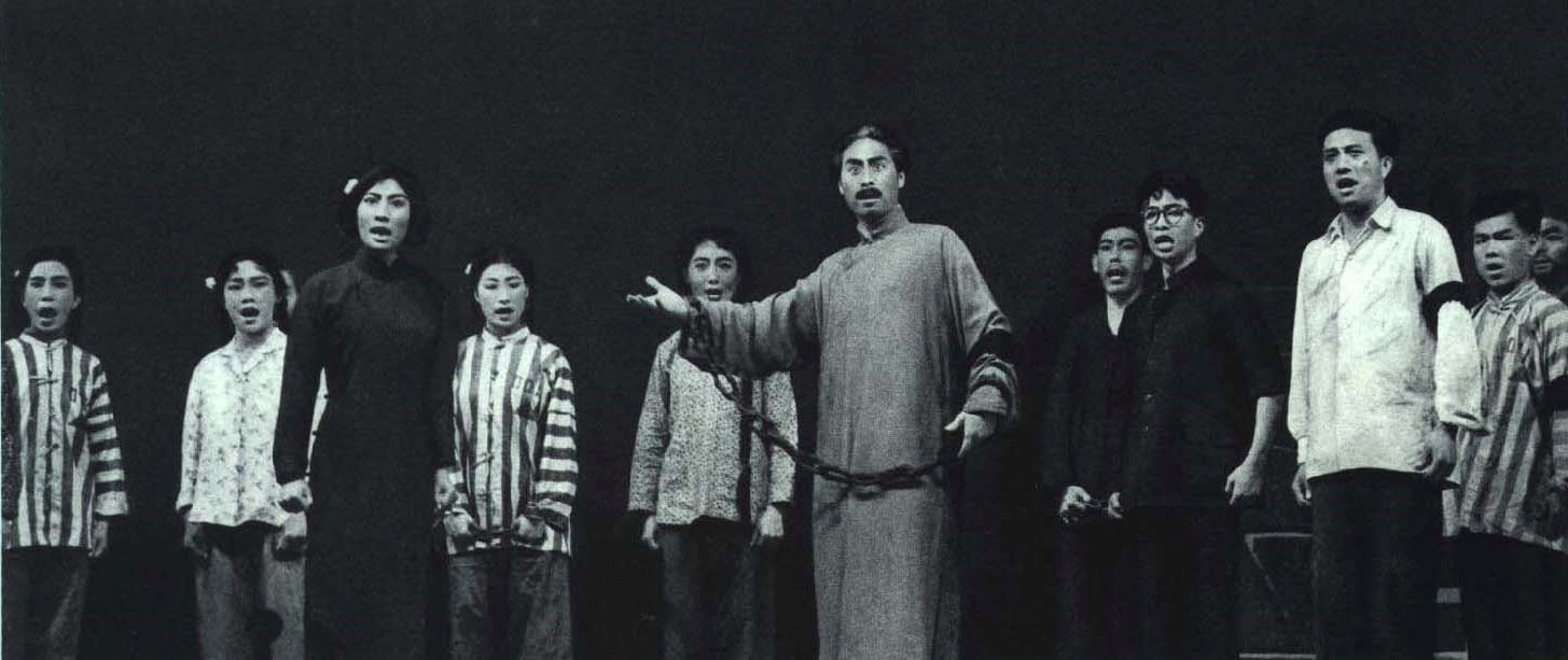 1964-09 1964年 红岩